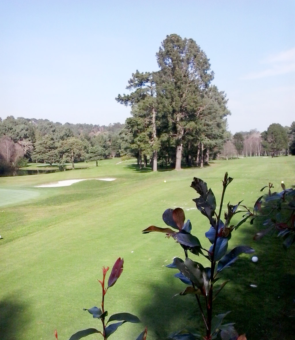 Campo de Golf da Zapateira